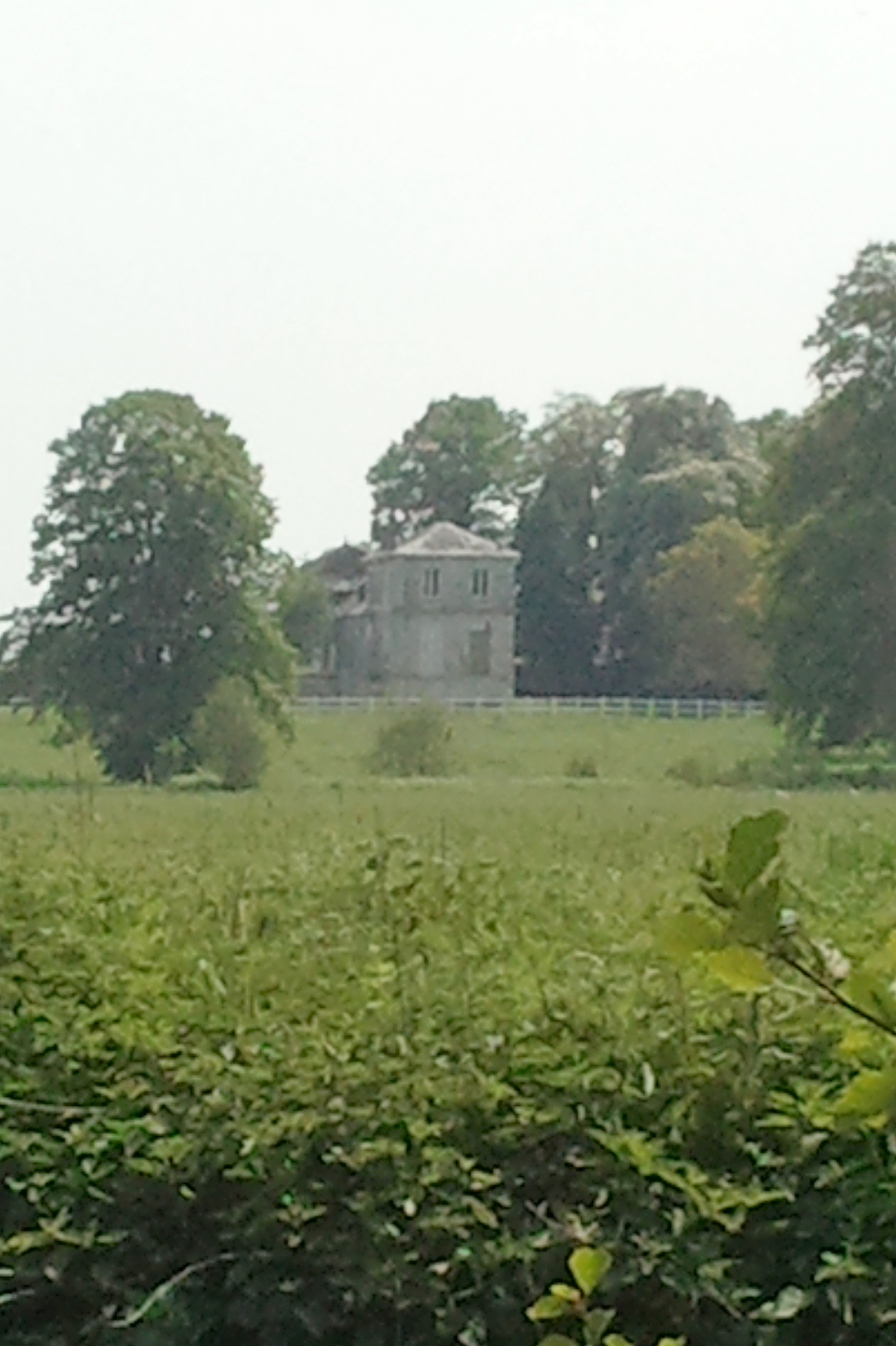 Ancien château de Ver-lès-Chartres, Eure-et-Loir (France).